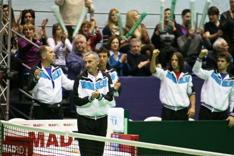 Davisov kup 2011. u Zagrebu